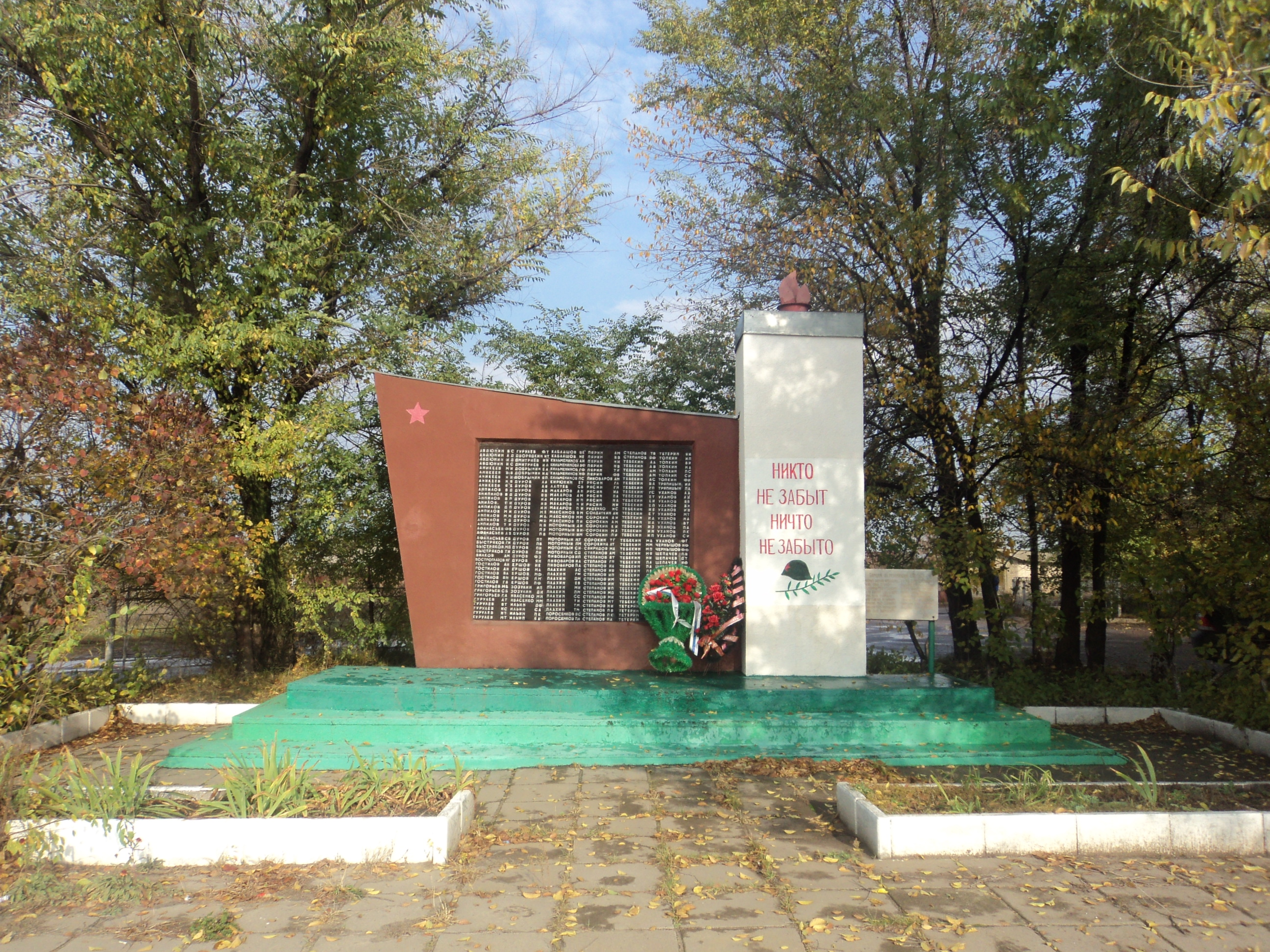 Памятник погибшим в Великой Отечественной войне. Бабка, Воронежская область, Россия